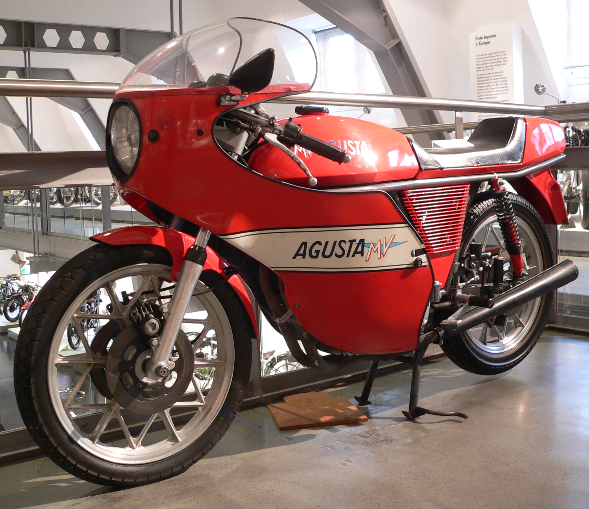 Motorbike "MV Agusta Ipotesi 350" (1978) at the Deutsches Zweirad- und NSU-Museum (349 cm³, 34 PS bei 8.500 U/min, 170 km/h)